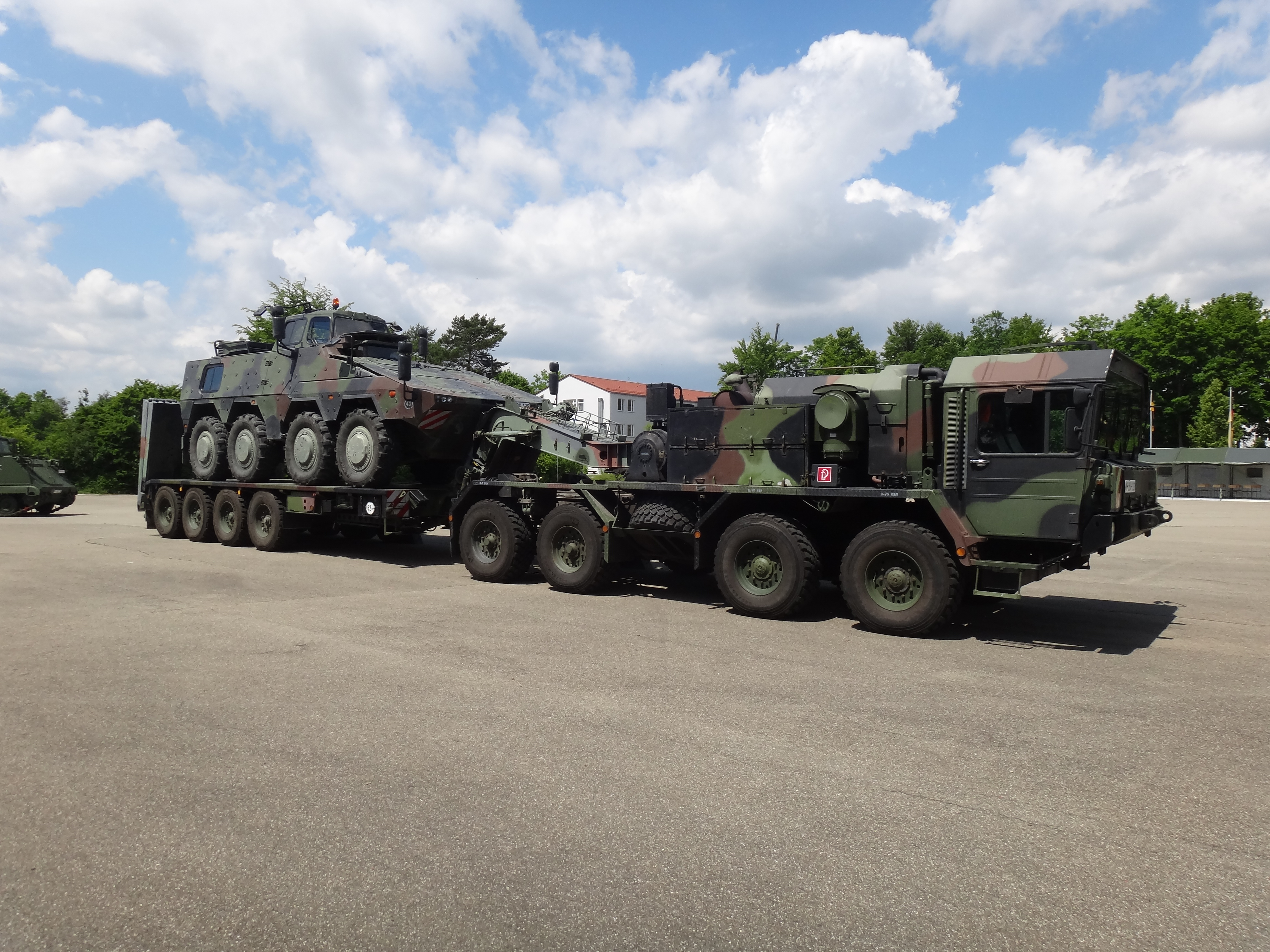 SLT Elefant mit Fahrschulpanzer GTK Boxer